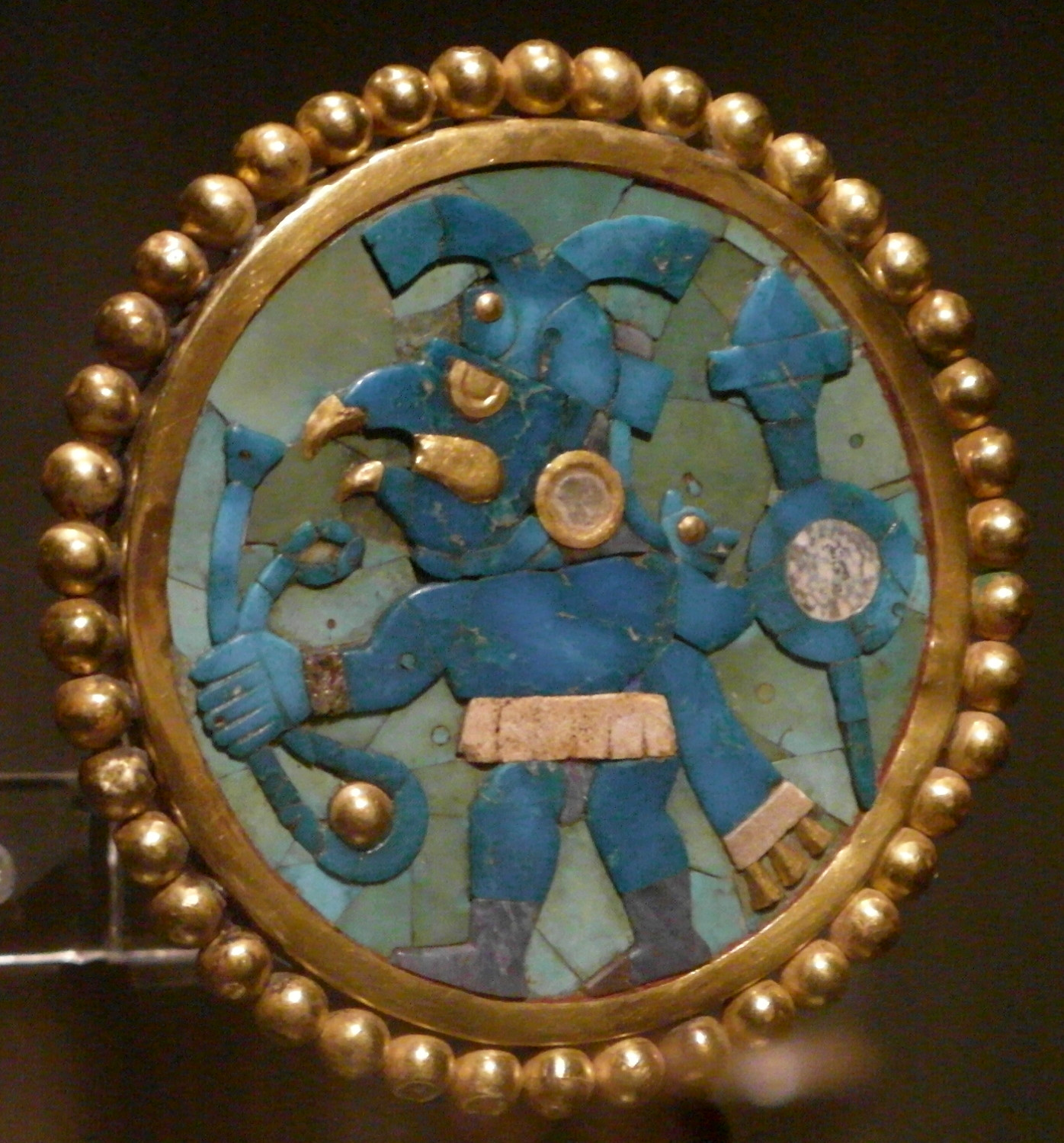 Orejera con ave guerrera, en oro, lapisláluzi, turquesa y concha. Arte mochica.